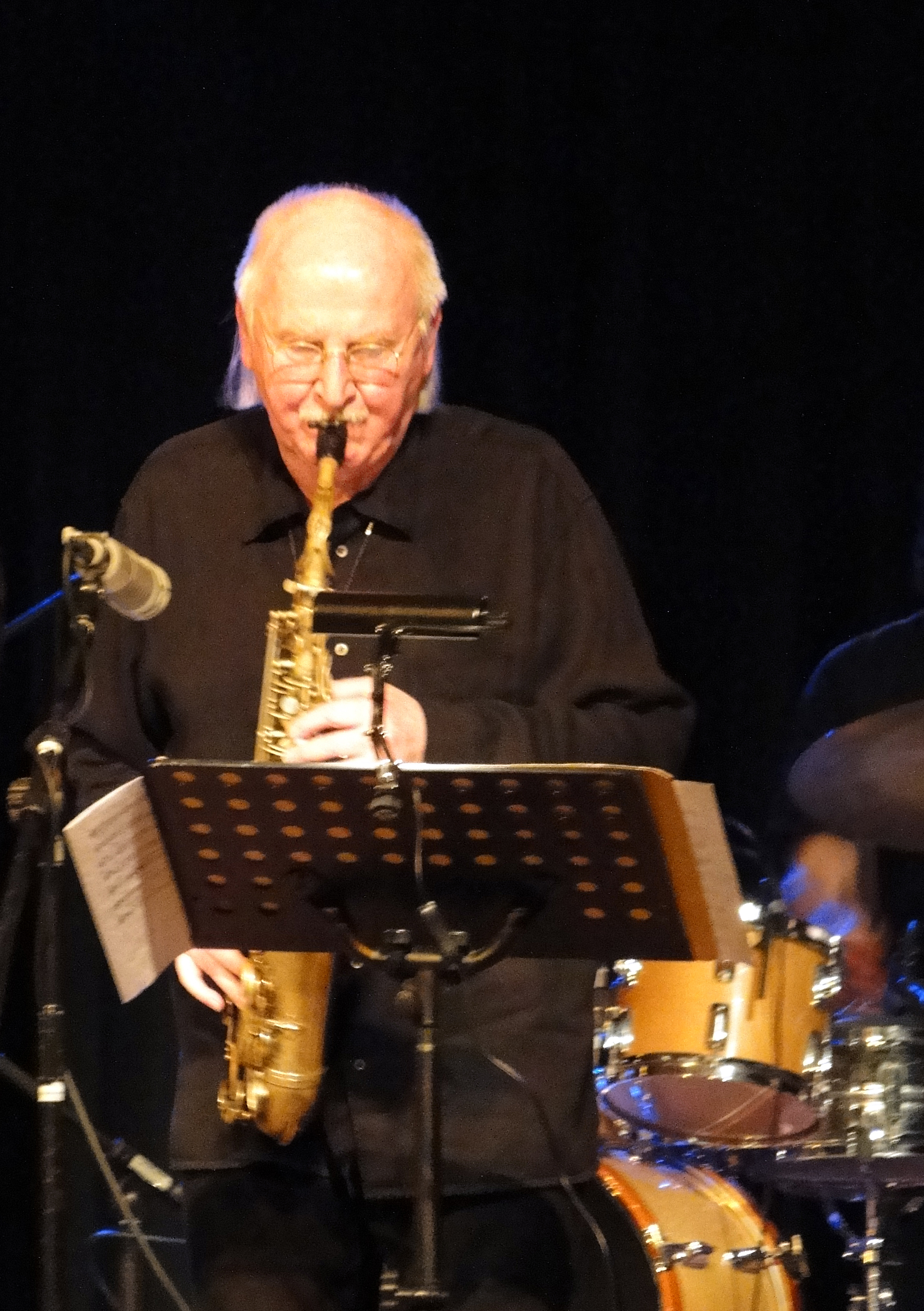 Friedhelm Schoenfeld, als Mitglied des "Ekkehard-Jost-Oktetts", auf dem Hofheimer Jazz Festival 2009.